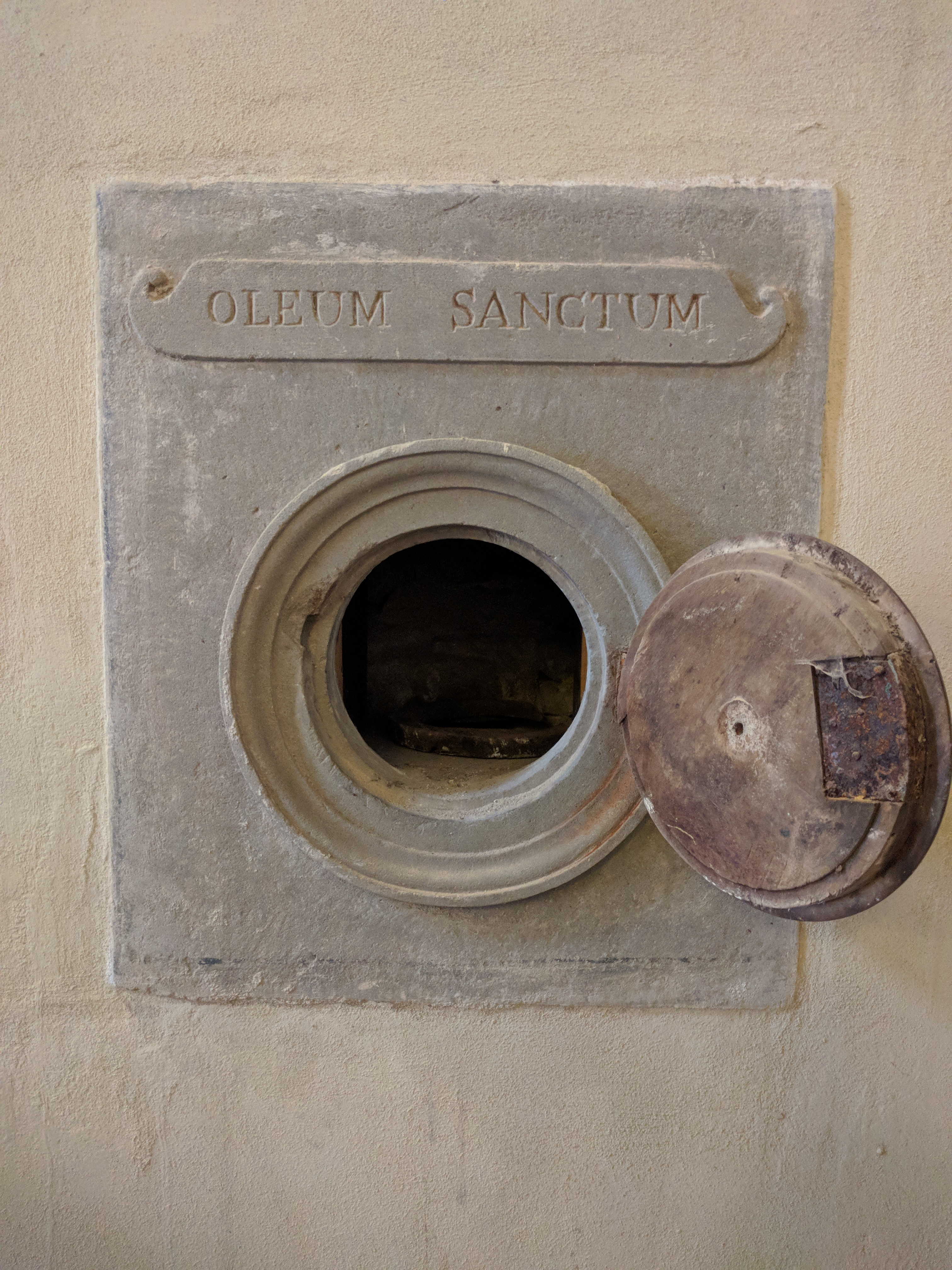 Buca per contenere l'olio santo all'interno della Cappella Madonna della neve a Firenze